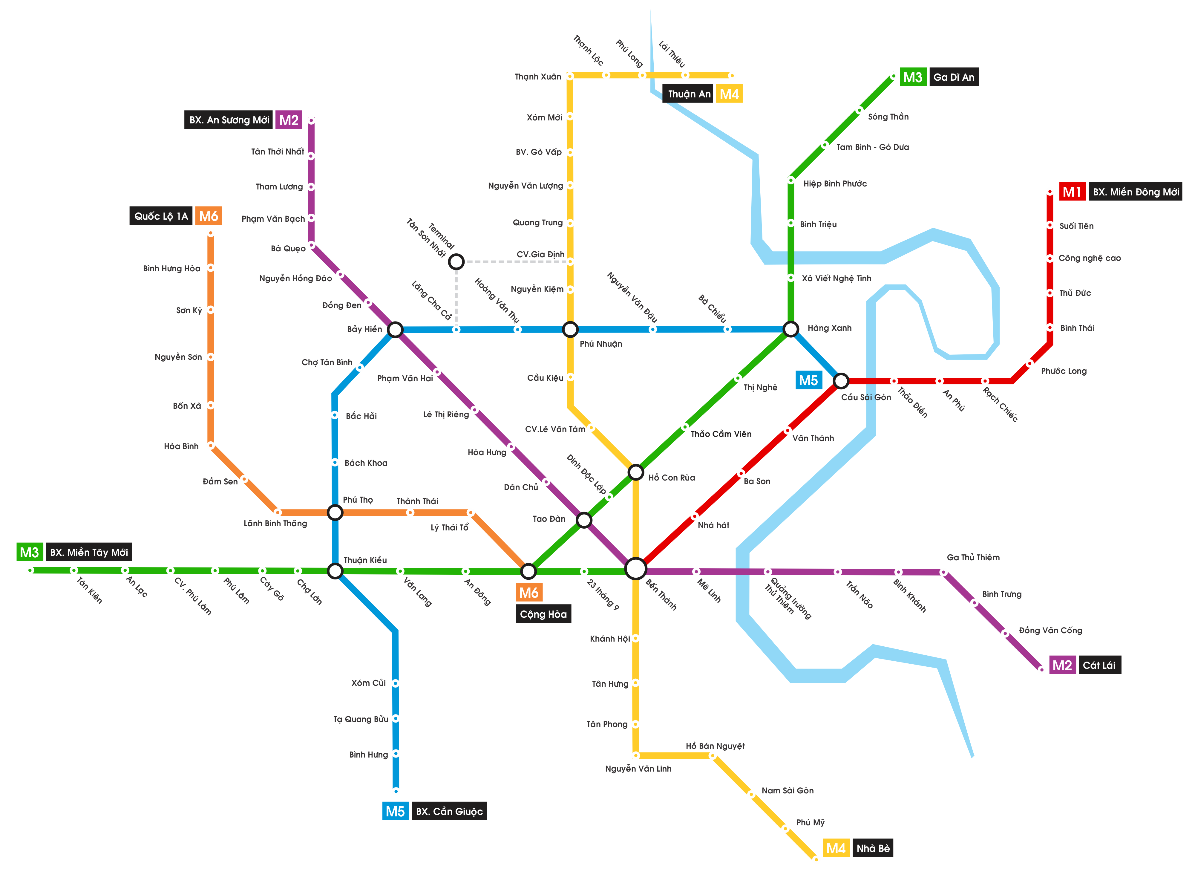 Sơ đồ tuyến đường sắt đô thị theo quy hoạch